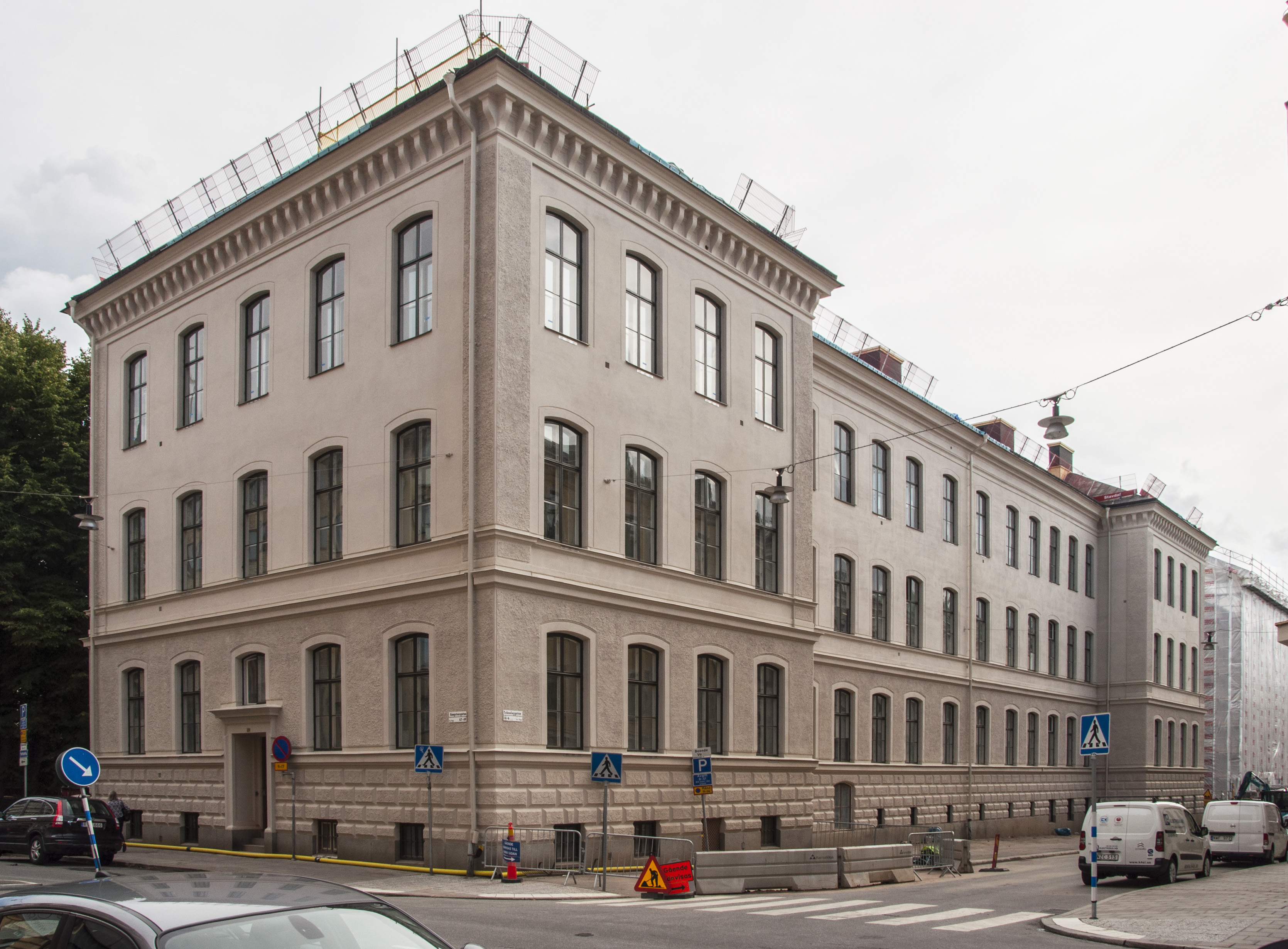 Laboratoriebyggnaden, Gamla teknologiska institutet. teknologgatan 8-14 . Nybyggnadsår 1896 - 1899. Arkitekter Frans Gustaf Abraham Dahl, Herman Theodor Holmgren